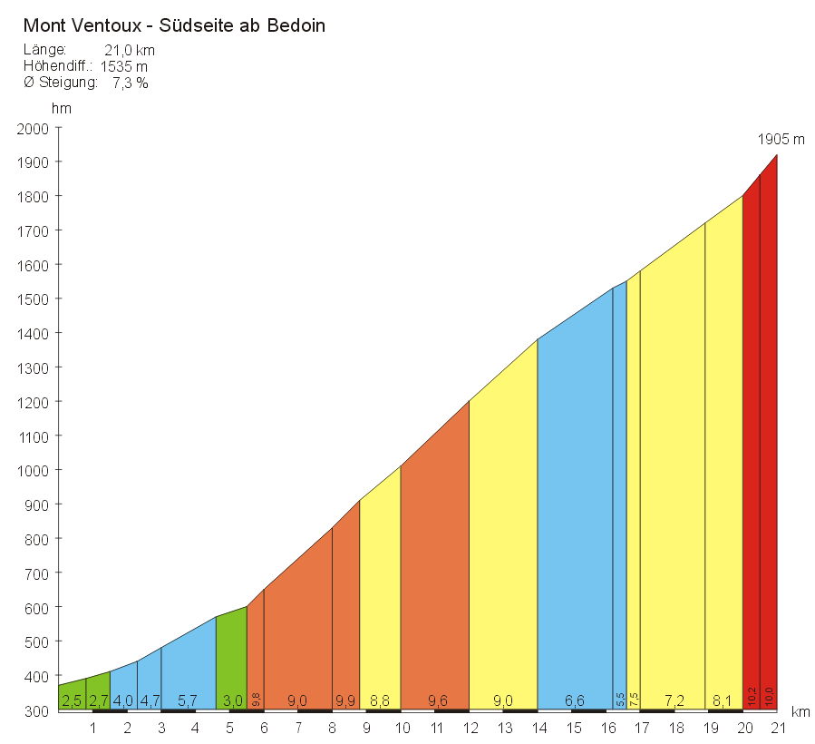 Steigungsprofil Mont Ventoux, Südseite von Bedoin Autor: Stephan Brunker